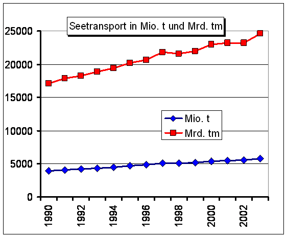 Zeitliche Entwicklung des globalen Güterverkehrs in Mio. t und der Transportleistung in Mrd. Tonnen-Meilen (tm) über See (Graphik Dr. Hochhaus, Daten: ISL)